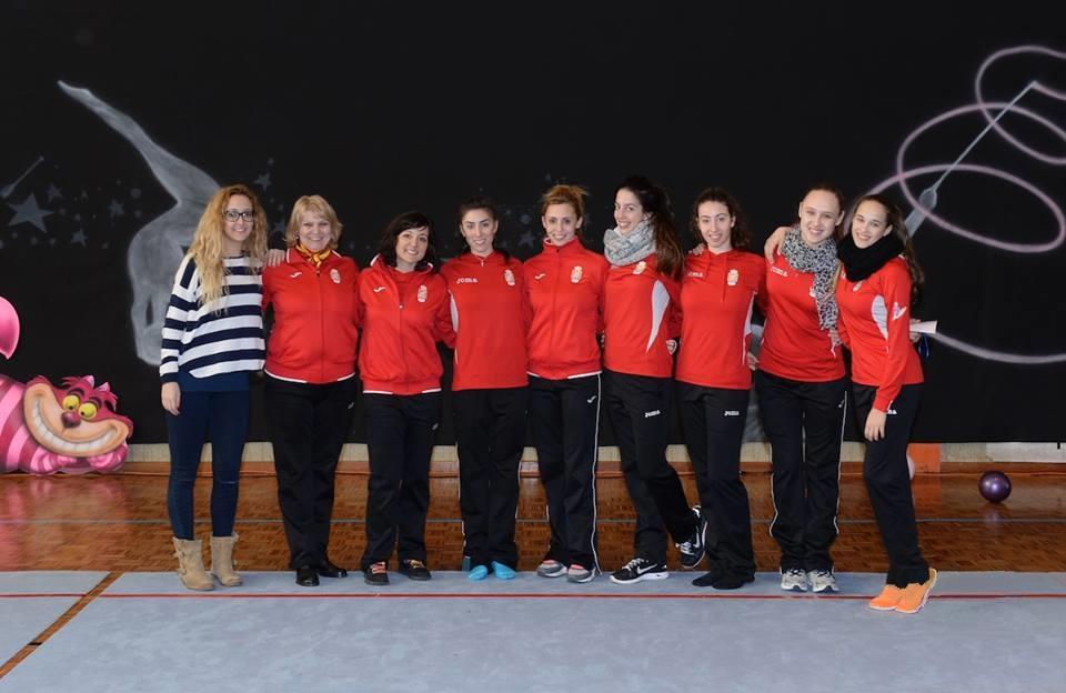 Parte del conjunto español de gimnasia rítmica durante una master class en Luarca (Asturias) en marzo de 2015. De izquierda a derecha: Isabel Pagán (secretaria técnica de la Federación), Anna Baranova (seleccionadora), Sara Bayón (entrenadora), Sandra Aguilar, Lidia Redondo, Alejandra Quereda, Artemi Gavezou, Adelina Fominykh y Claudia Heredia.